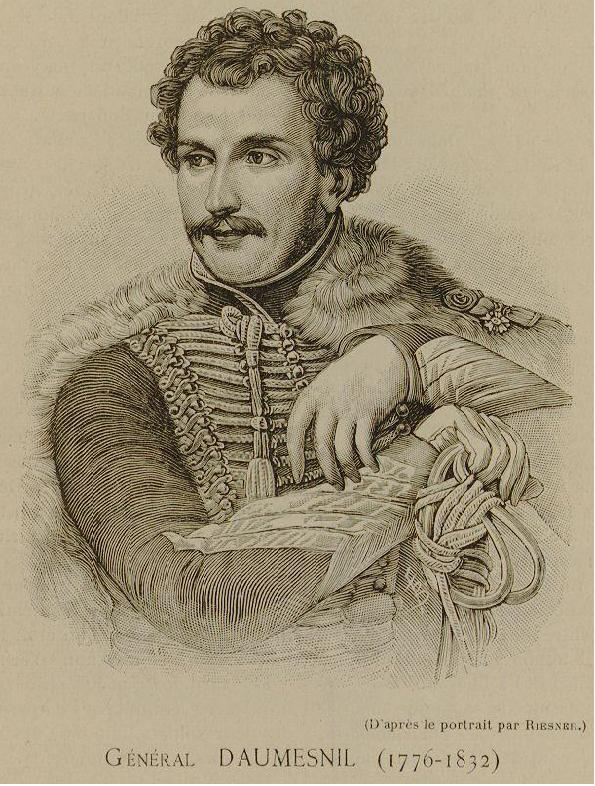 Title